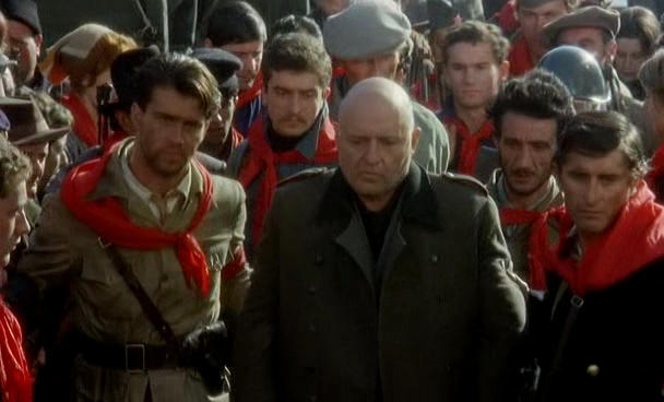 Screenshot del film Mussolini: Ultimo atto (1974) di Carlo Lizzani